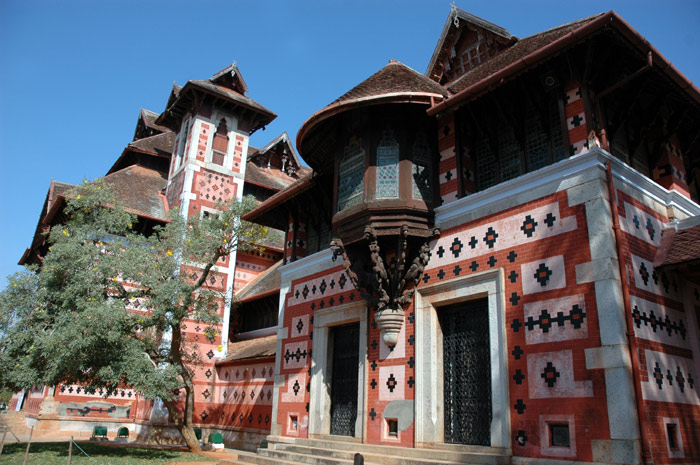 നാപിയർ മ്യൂസിയം, തിരുവനന്തപുരം.